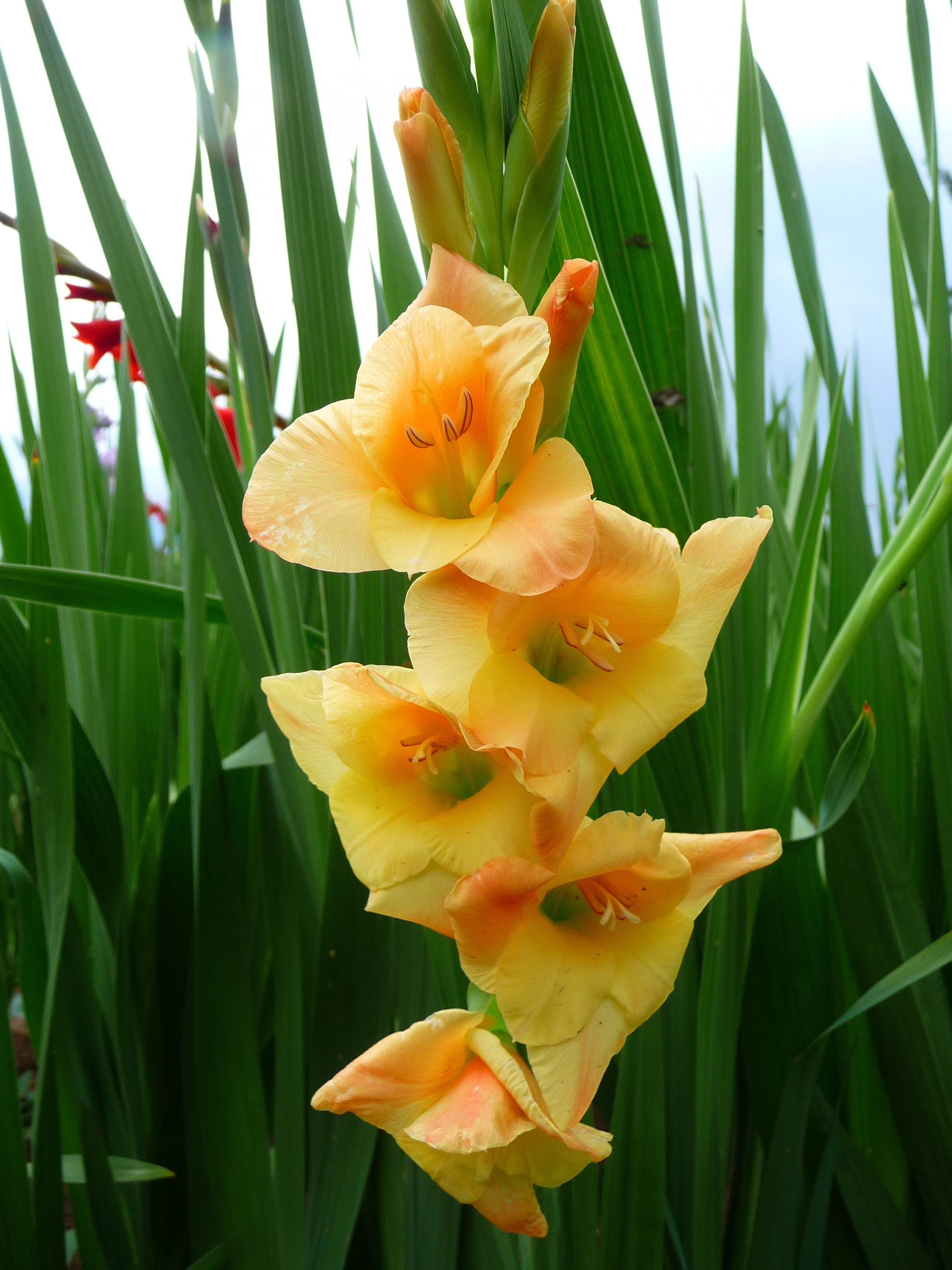 Apricotfarbene Gartengladiole (Gladiolus × hortulanus)